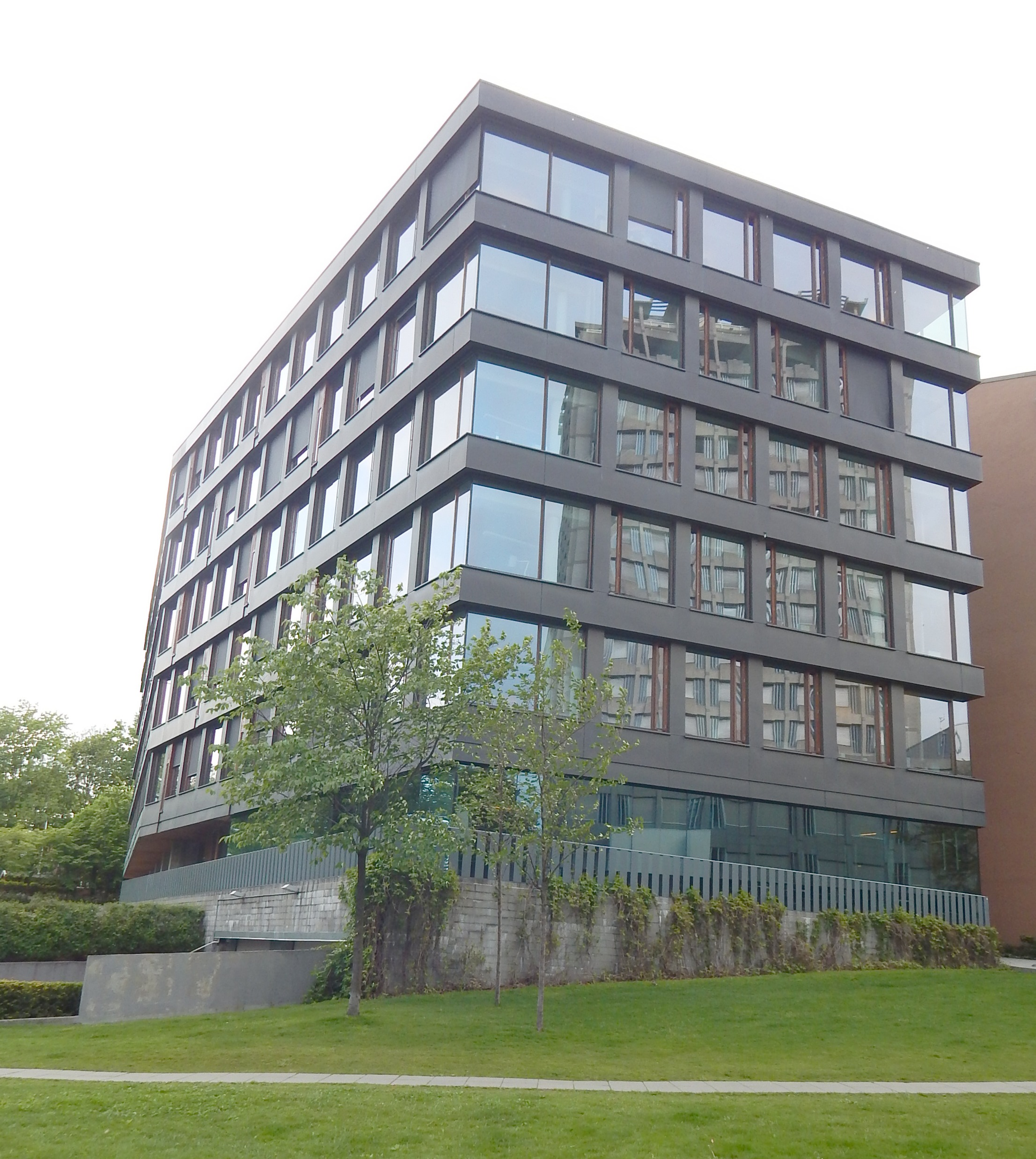 Observatoriegata 1B, bak Nasjonalbiblioteket